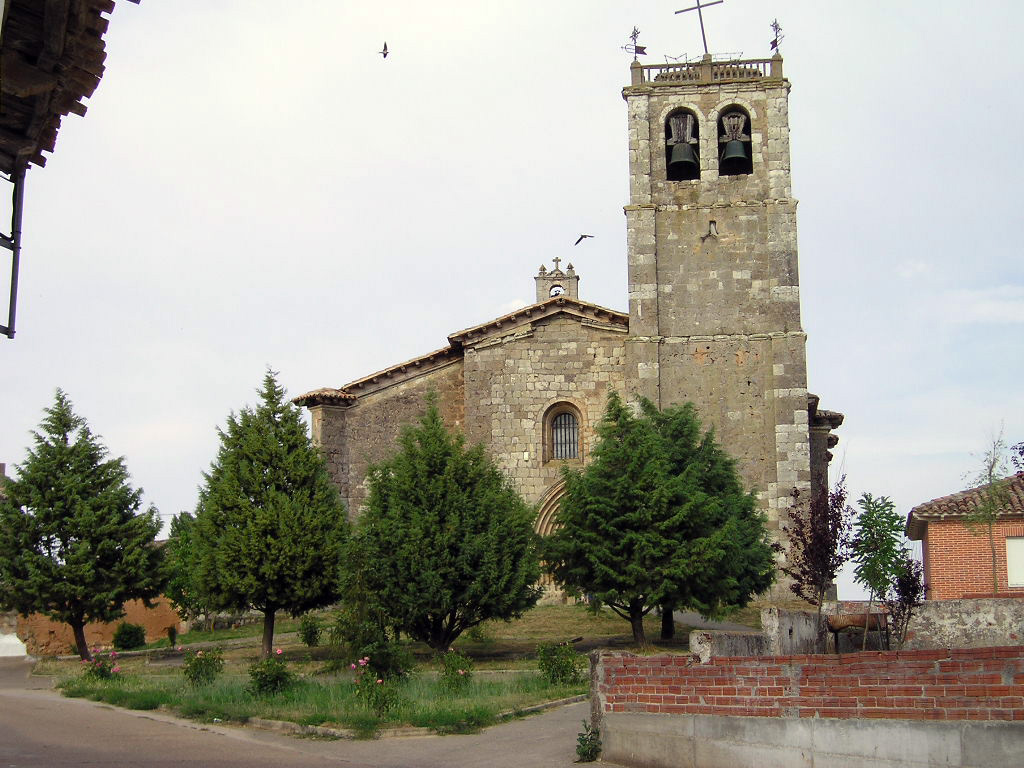 Iglesia de San Pedro y San Pablo. Villanueva de Odra. España.